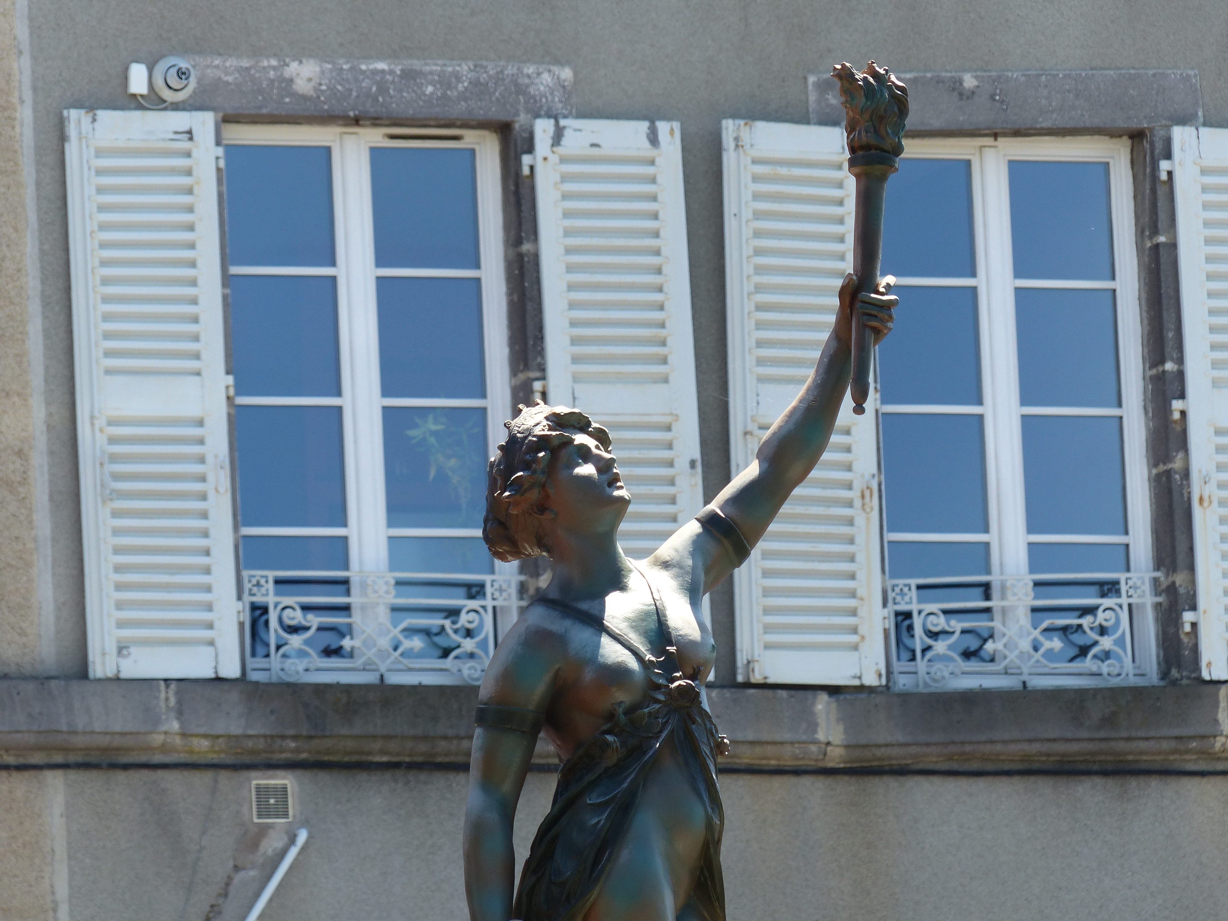 Fontaine